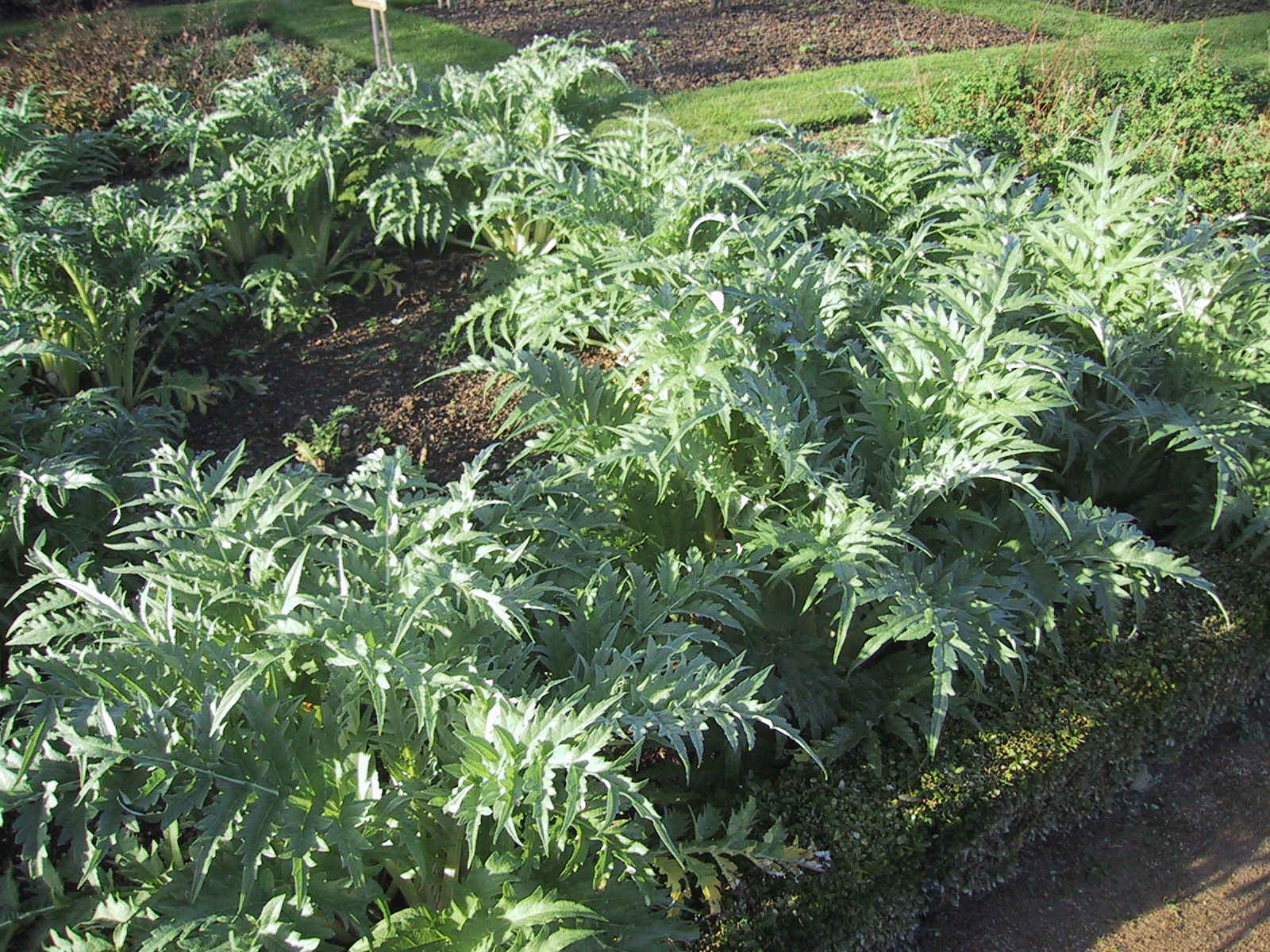 Cynara scolymus